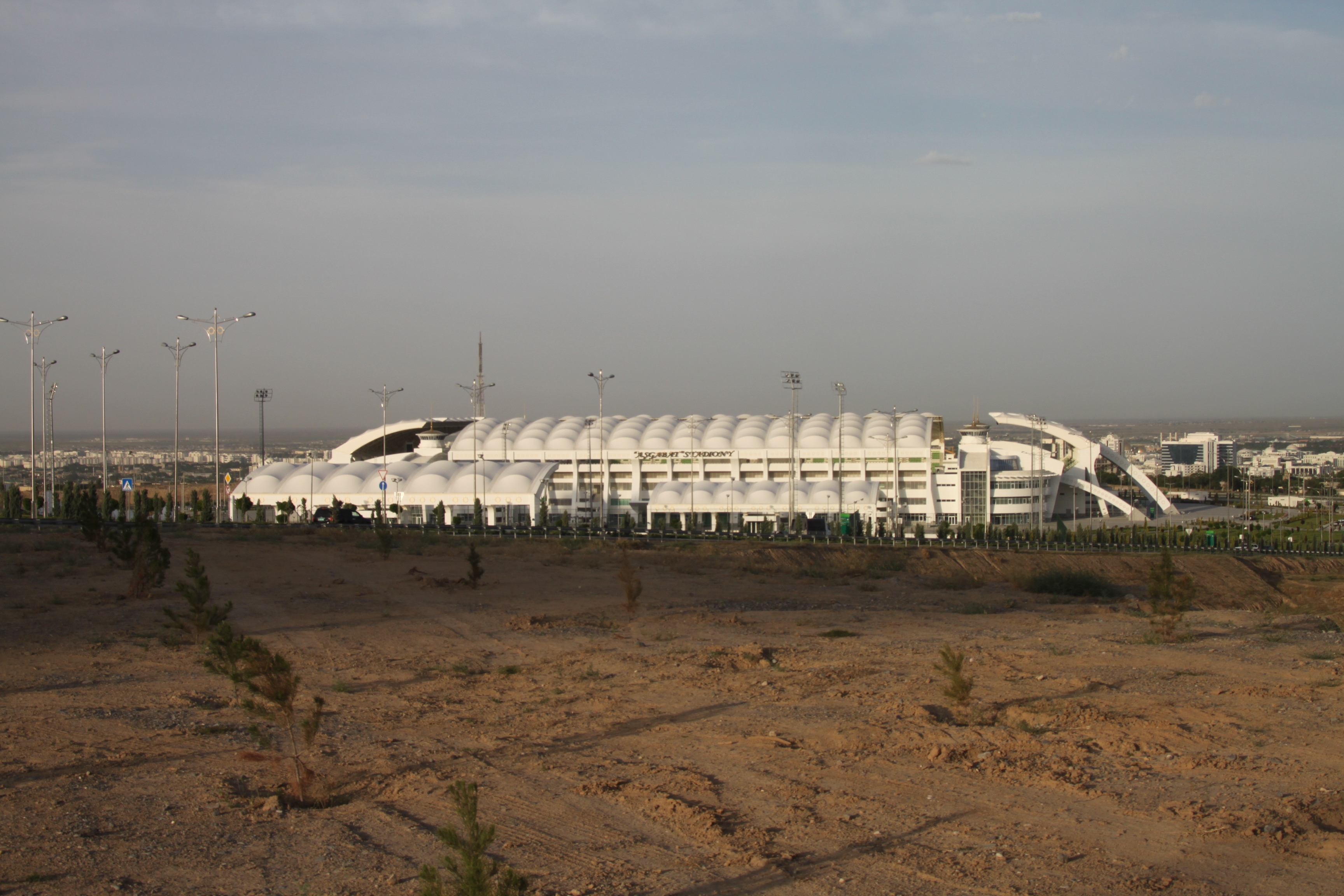 Ashgabat suburbs IMG_5855